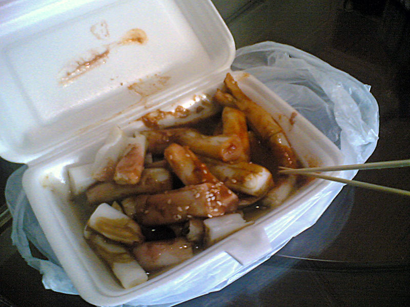 中文（香港）: 豬腸粉